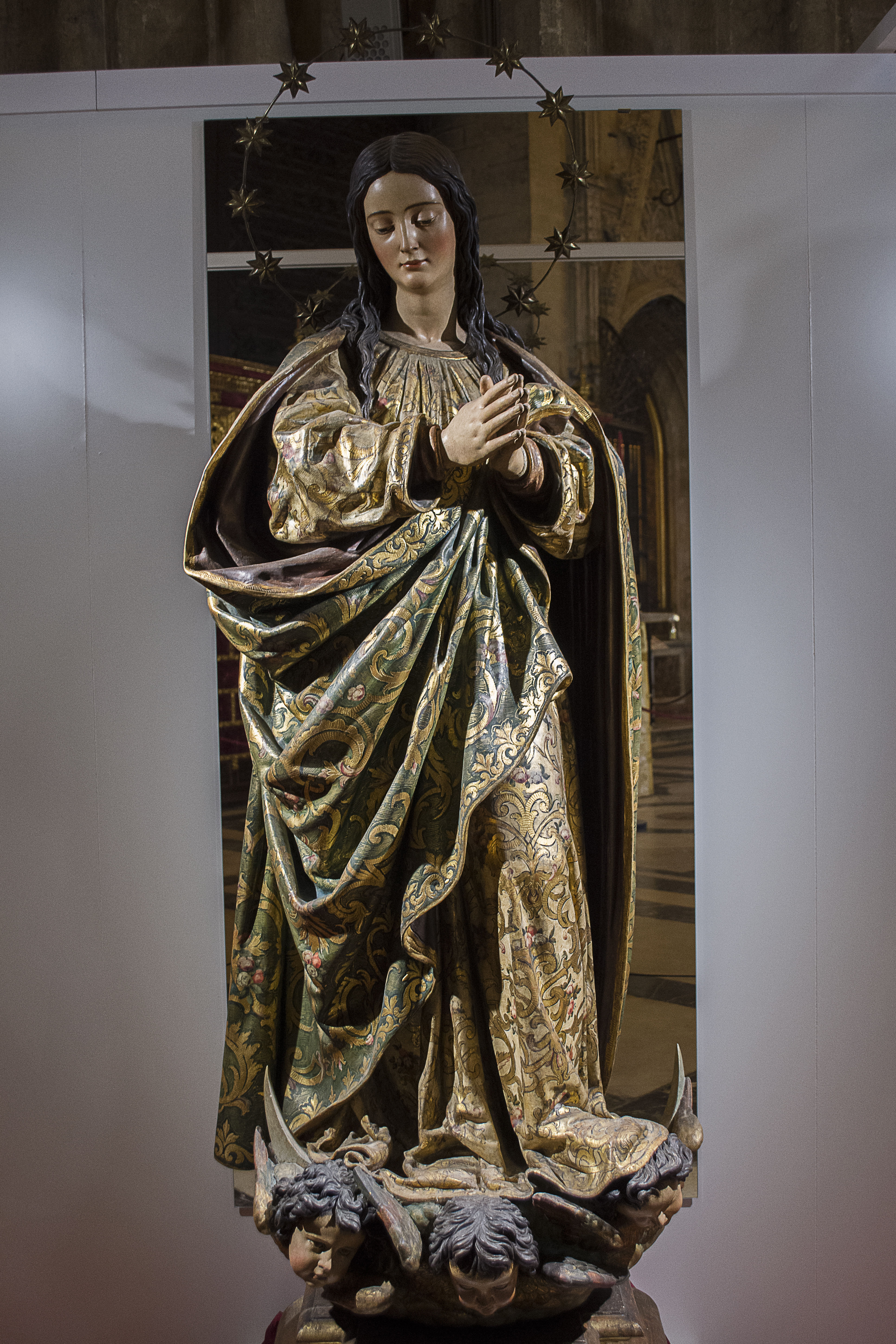 Inmaculada, (La Cieguecita) (1629-1631), autor: Juan Martínez Montañés, Catedral de Sevilla.